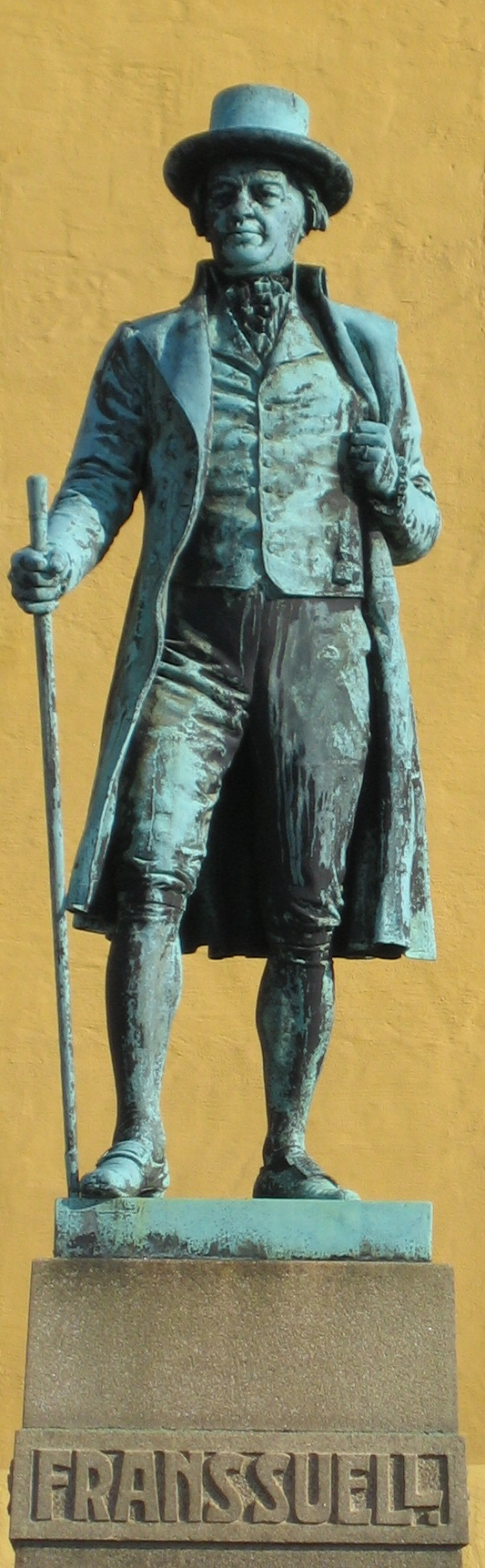 Frans Suell, statue in Malmö